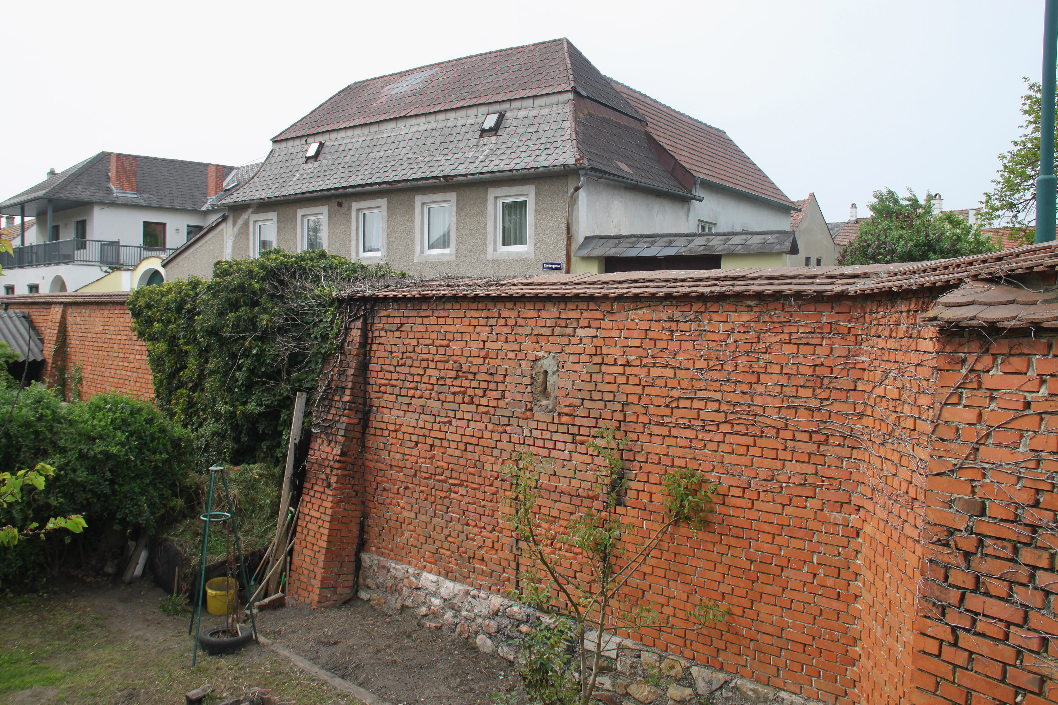 Befestigungsanlage, Mauer mit Wehrgraben (öffentlich)